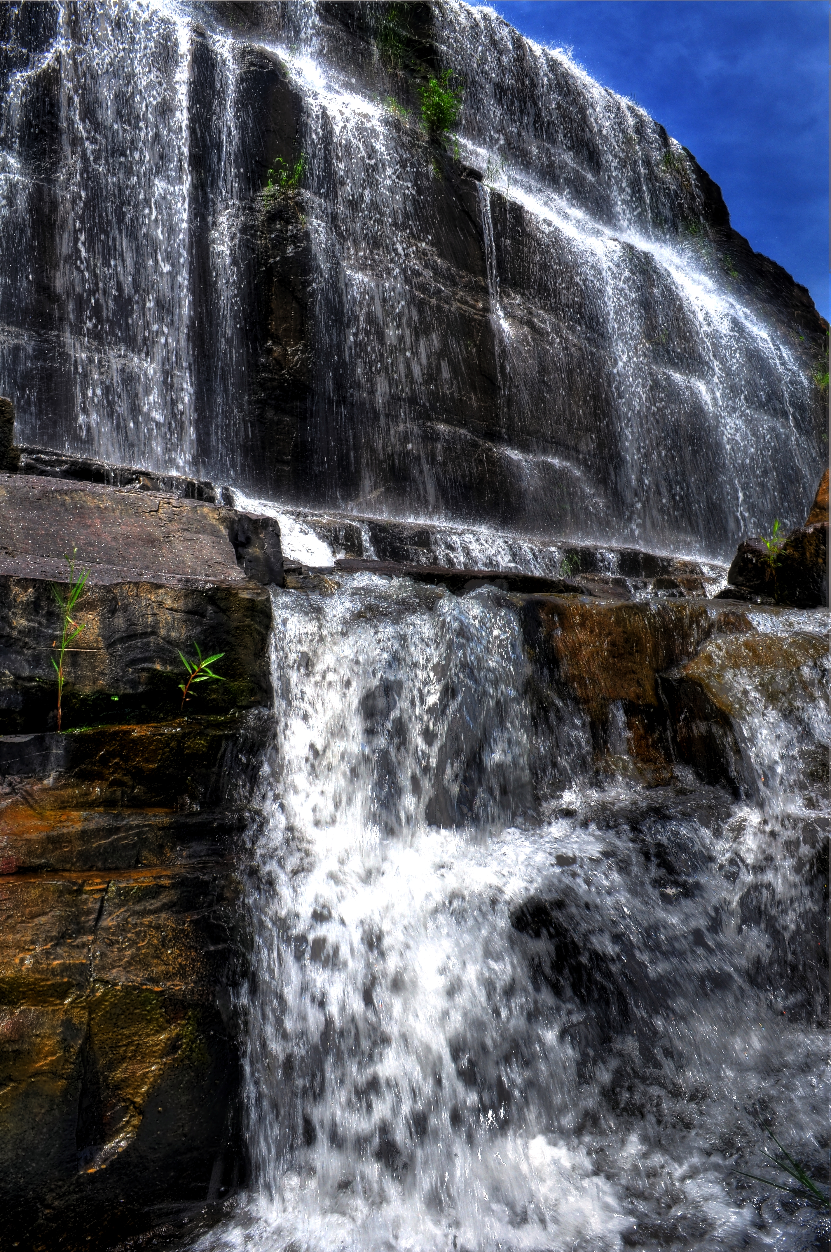 Gougah Waterfall